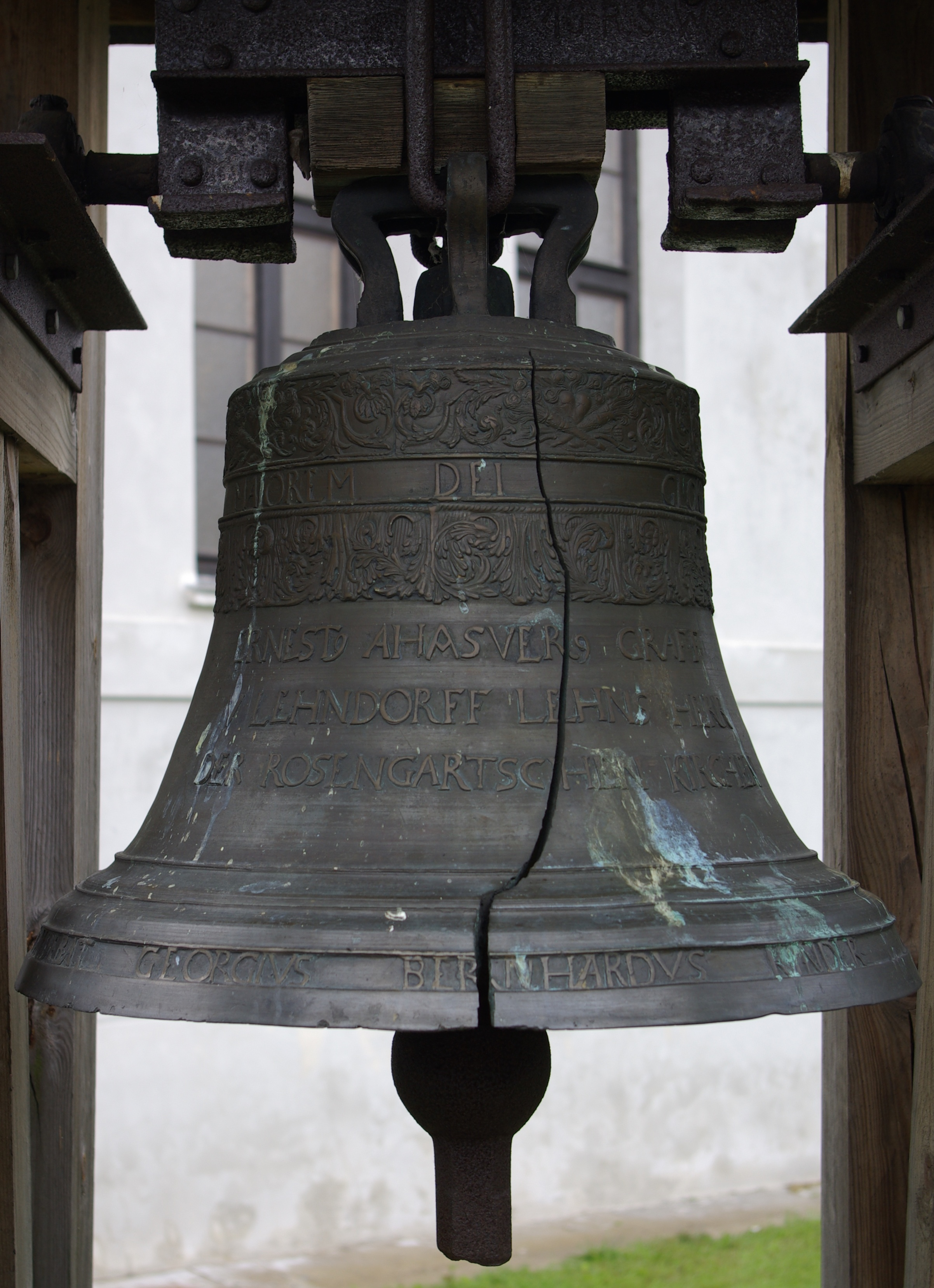 Radzieje, ul. Węgorzewska 17 - dzwonnica przy dawnym kościele ewangelickim, obecnie rzymskokatolickim parafialnym p.w. Chrystusa Króla, 1827